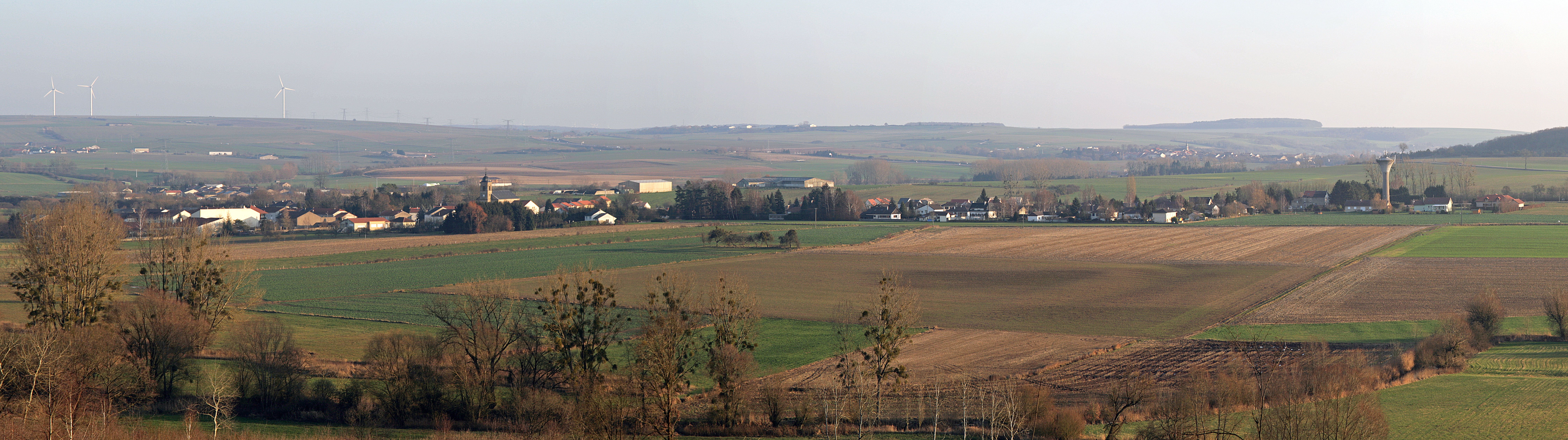 Vue panoramique sur la Commune de Condé-Northen. Photo réalisée depuis une clairière, suite à une coupe à blanc) dans le Bois de Condé.